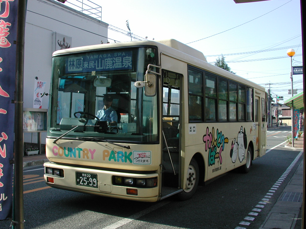 山鹿温泉にて撮影